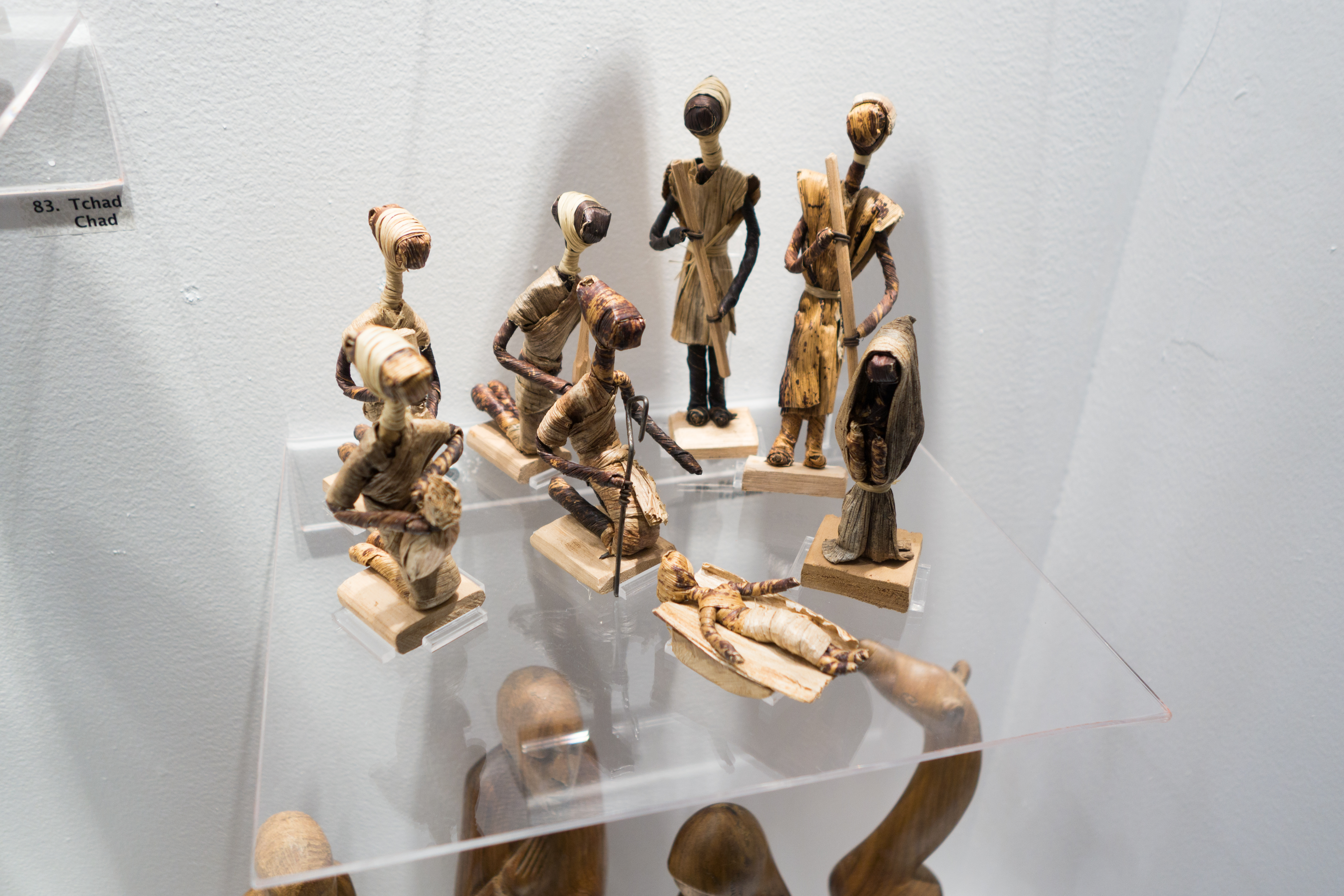 Montreal, 2017